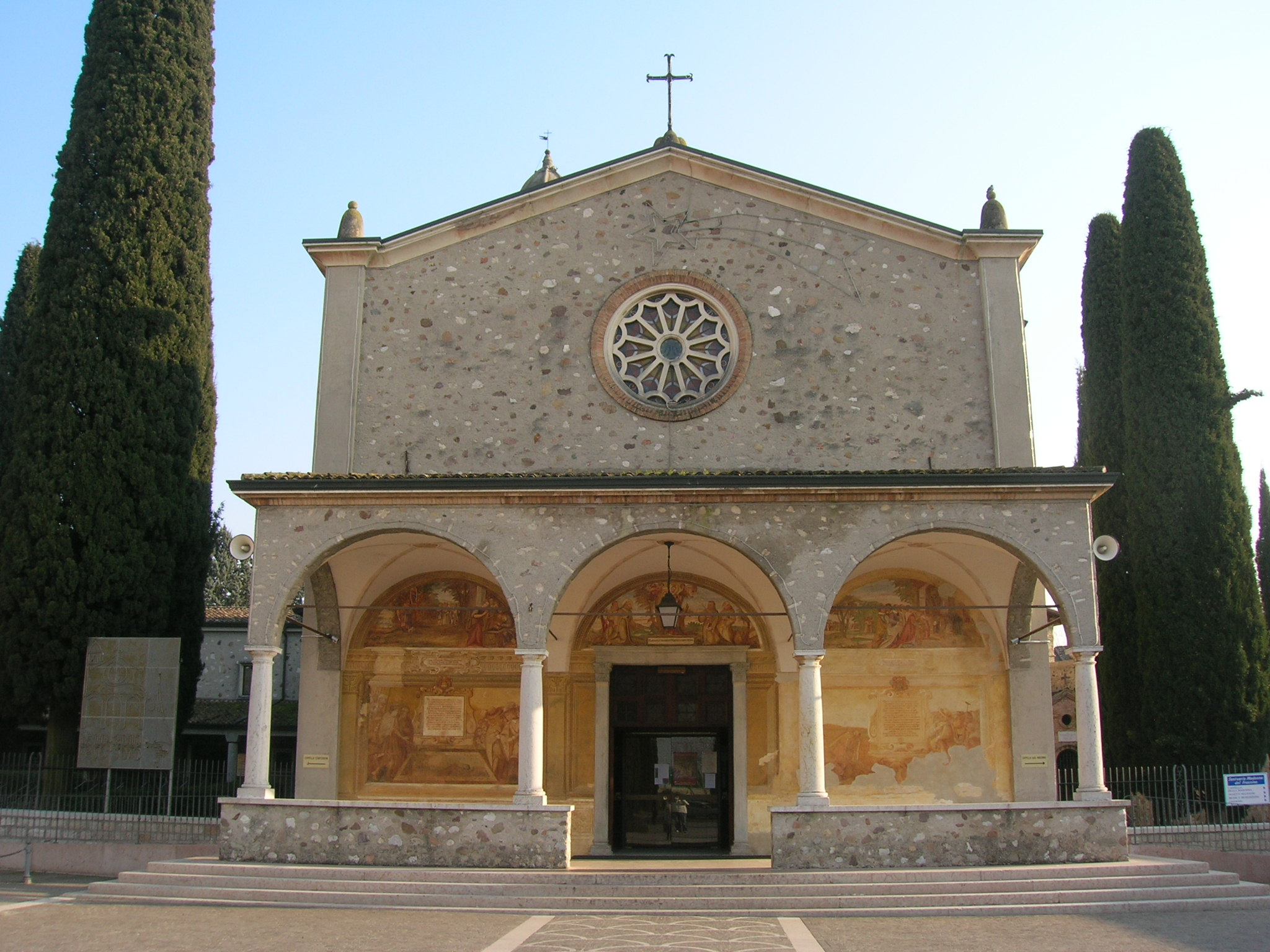 L'esterno